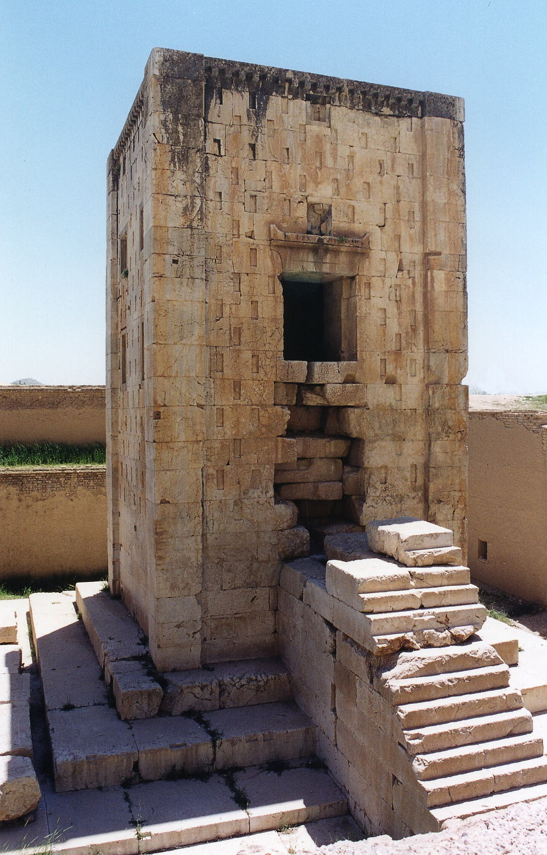 Naqsh-i Rustam (Iran). Temple achéménide dit "le Cube de Zoroastre". Vie-Ve s. av. J.-C. Photo Ginolerhino 2002.